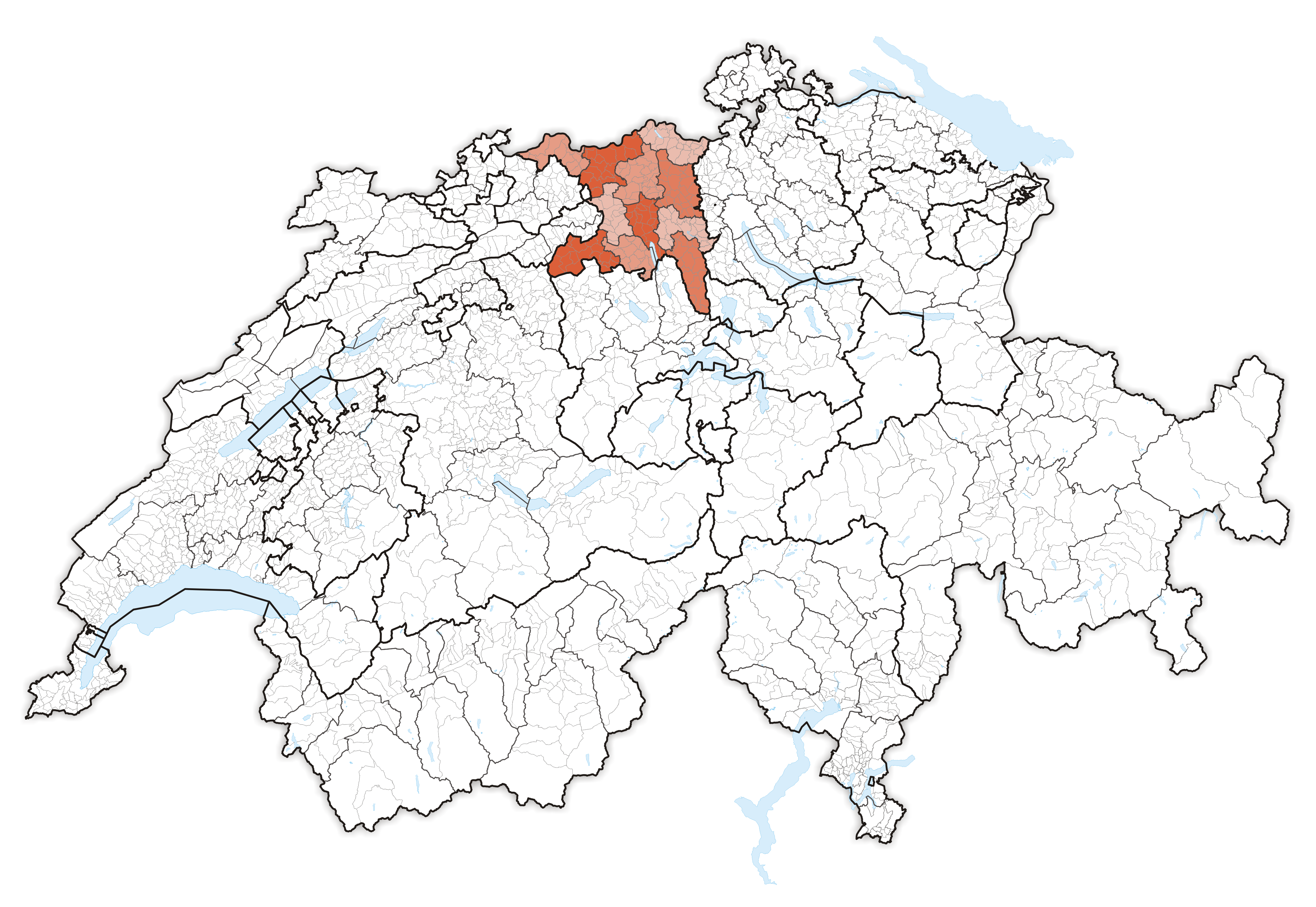 Canton Aargau